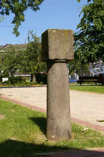 Wegestundenstein aus Postkutschentagen. Dieser gab die Entfernung in Stunden (Reisezeit mit der Kutsche) an.